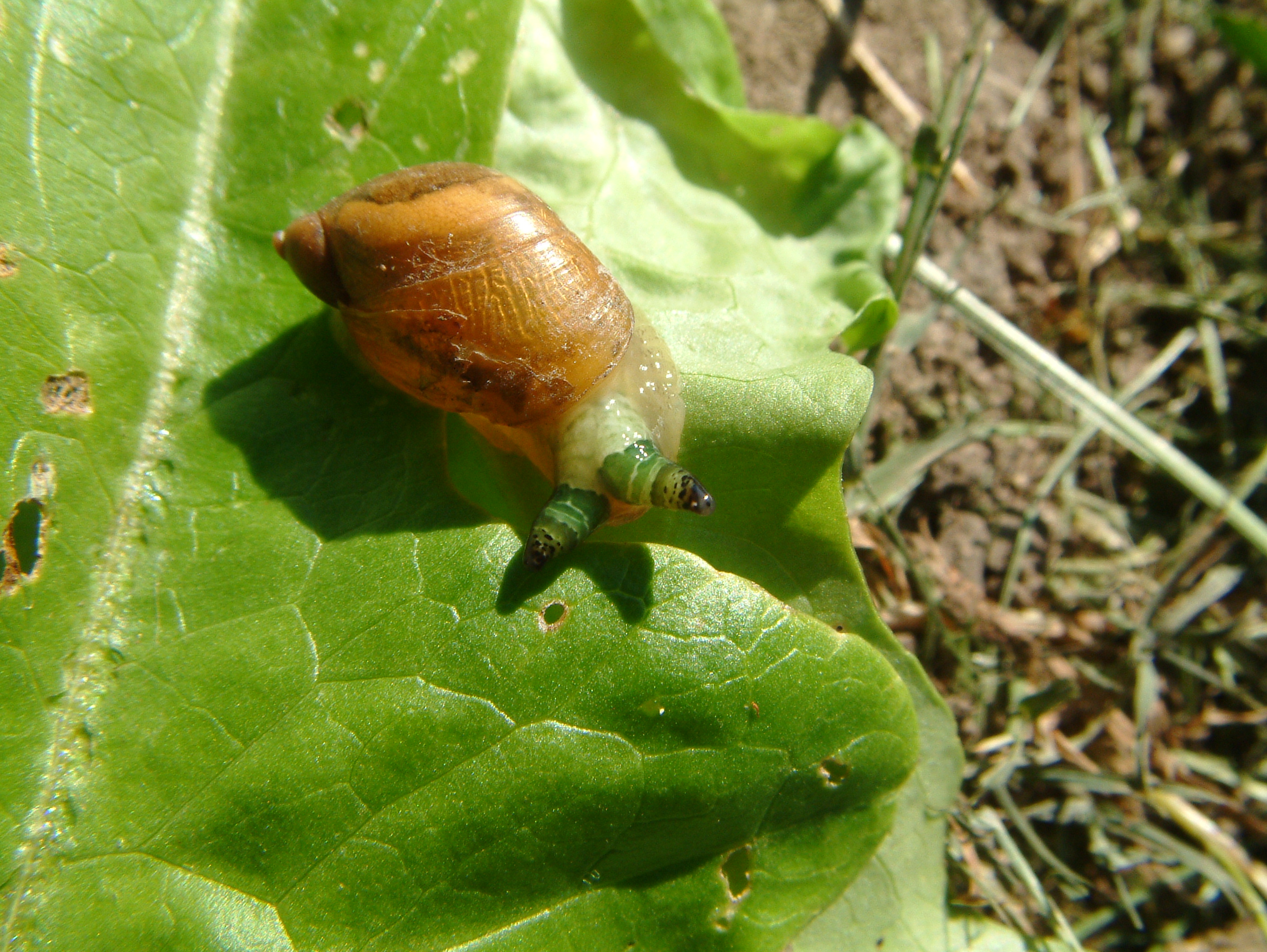 Fluke Leucochloridium macrostomum